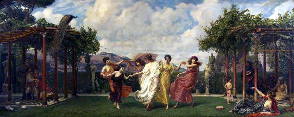 Horae Serenae